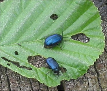 Agelastica alni (Elzenhaantje) op Alnus